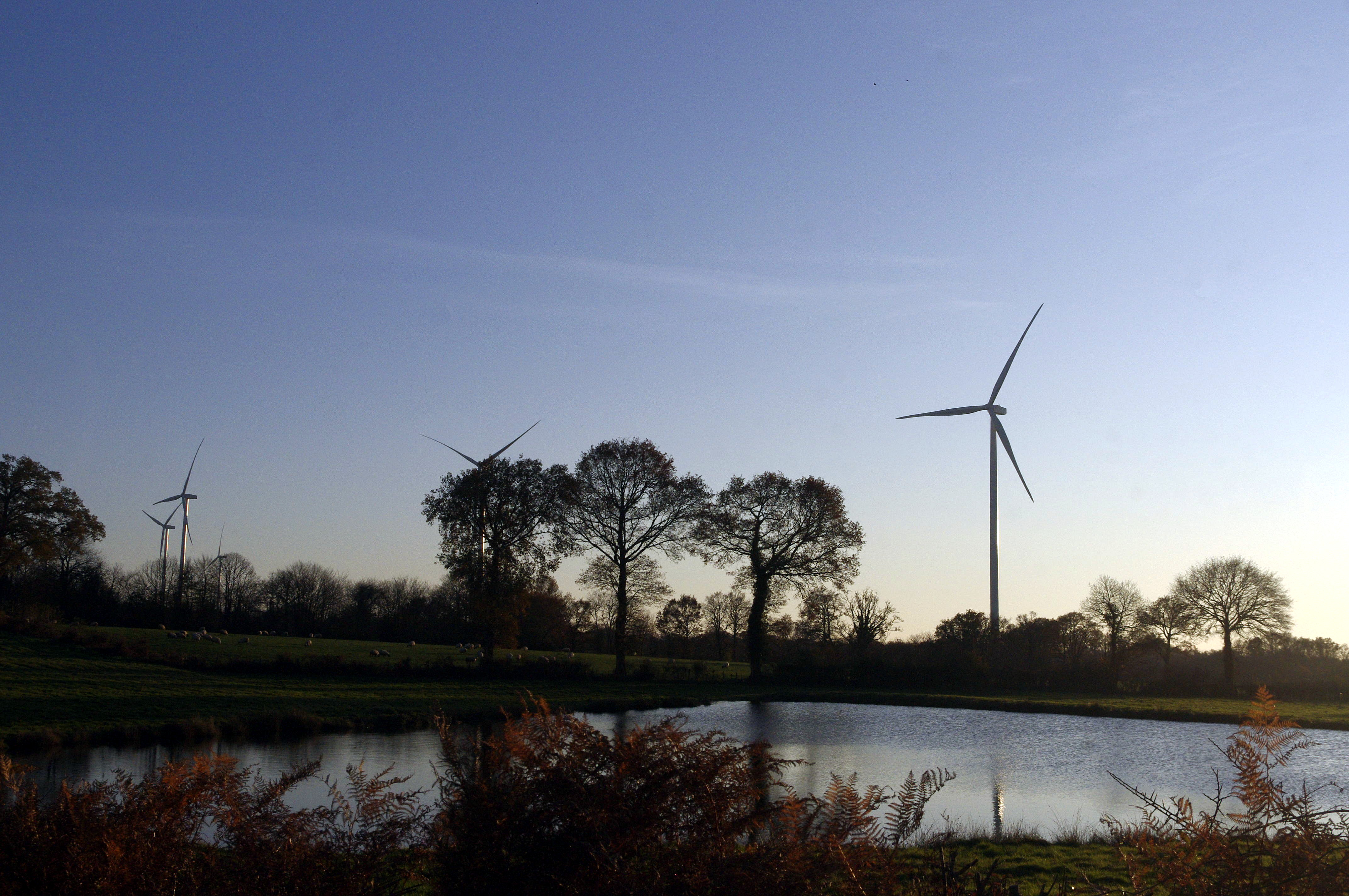 Parc éolien Les Landes sur les communes Saint-Bonnet-de-Bellac et Saint-Martial-sur-Isop, Haute-Vienne, Eoliennes de 200 m de haut, modèle Senvion 3.0M122. Sur la D 26A, rue des Etangs, à l'entrée du hameau Le Mas de Bost à plus d'un kilomètre des éoliennes.